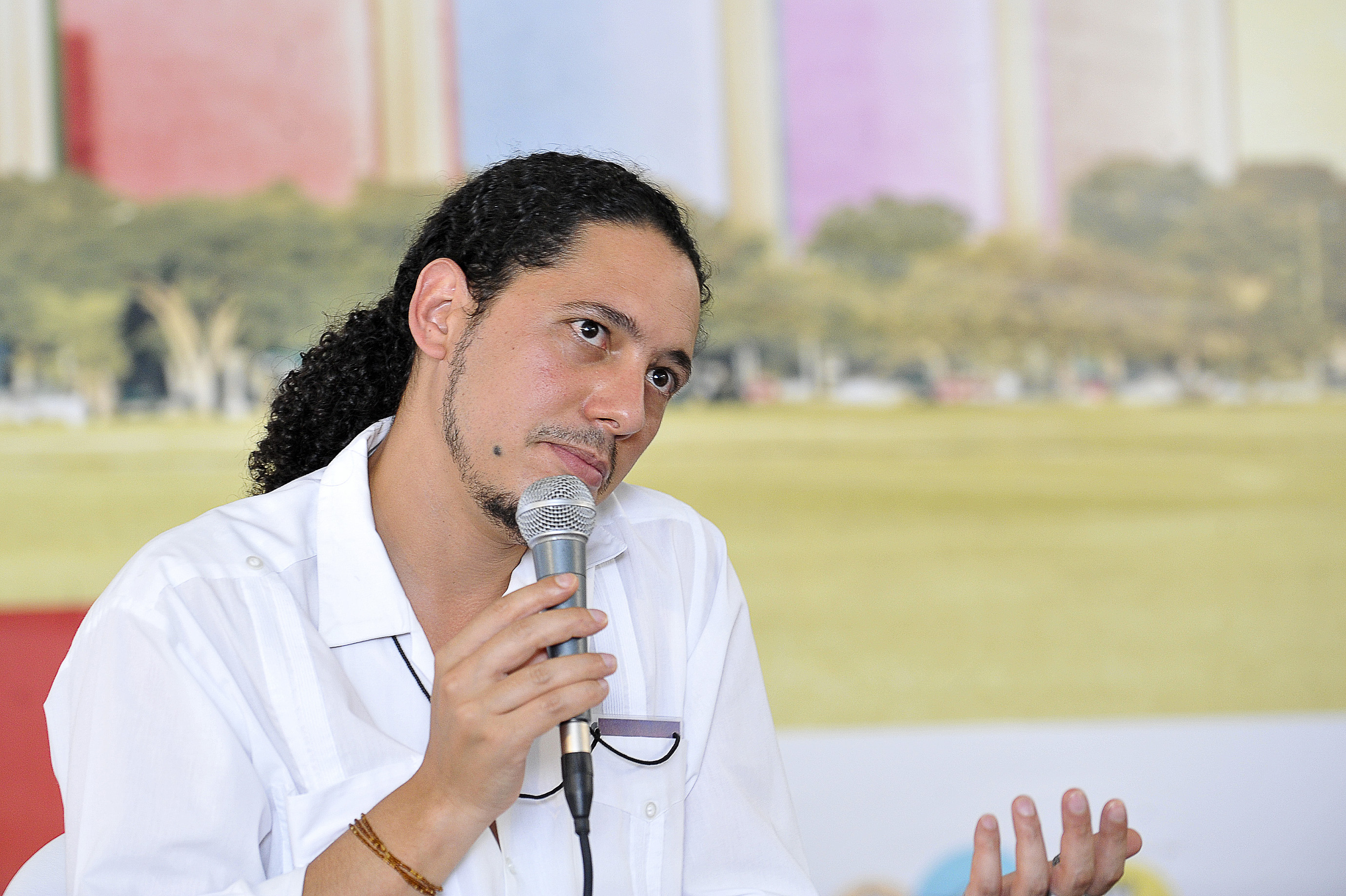 Brasília - O escritor angolano Ondjaki participa da 1ª Bienal do Livro e da Literatura.